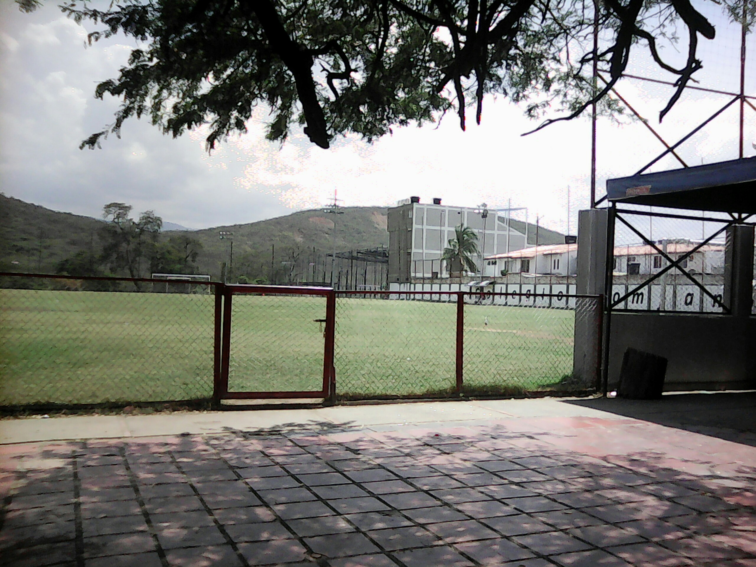 Campo de fútbol FESC localizado en el Colegio Comfanorte.